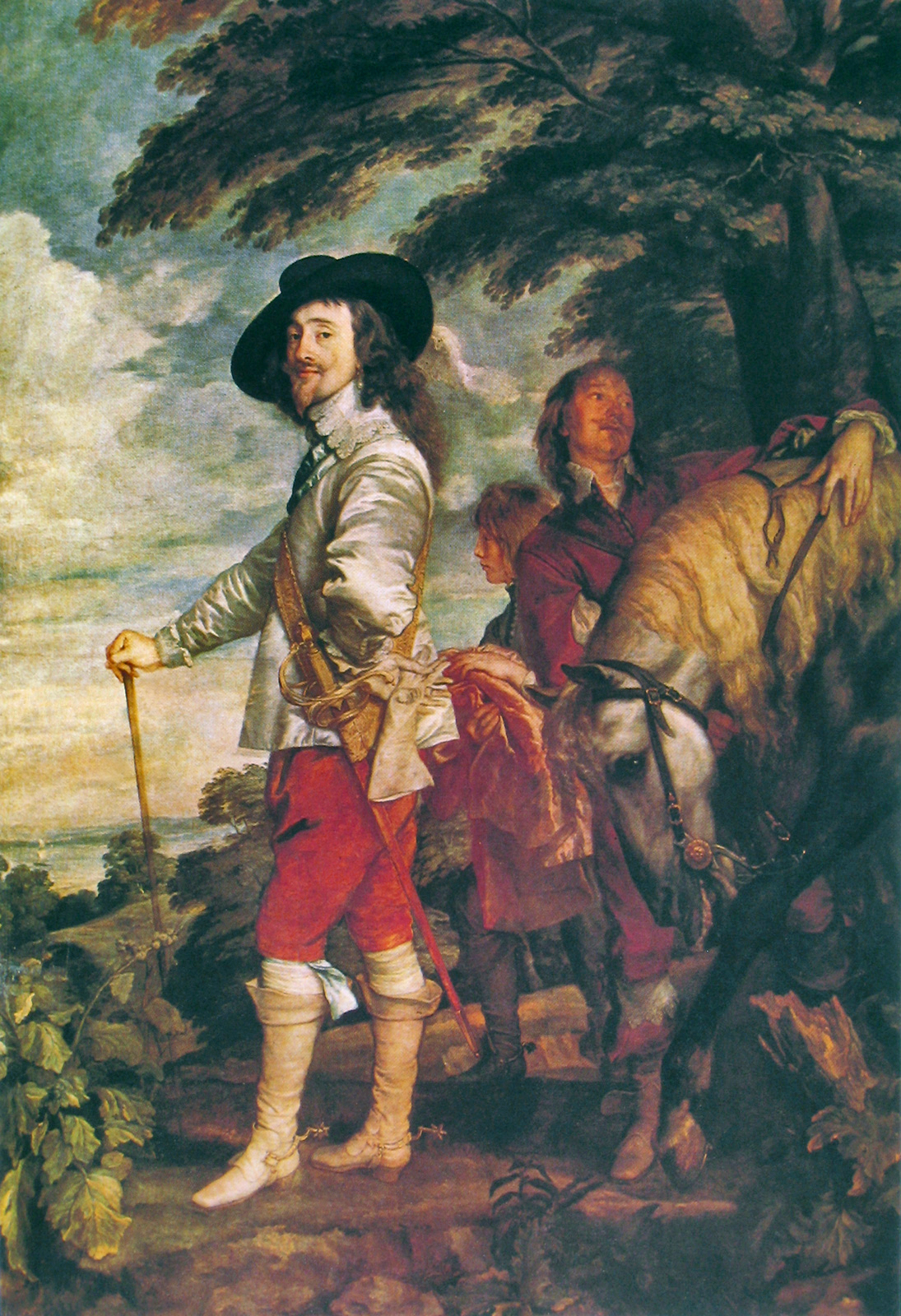 Charles Ier, roi d'Angleterre (1600-1649), dit Portrait du roi à la chasse